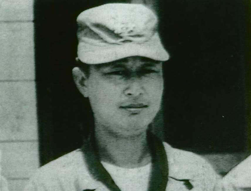 General Paik Seon-yup in 1951